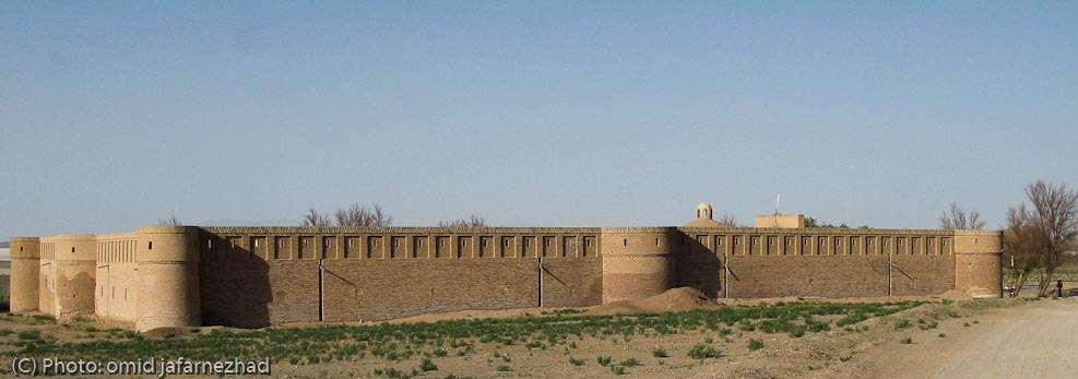 کاروانسرای کویر مرنجاب